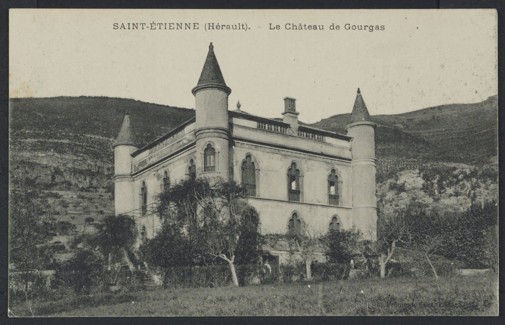 Saint-Etienne-de-Gourgas. - Le château de Gourgas : carte postale.